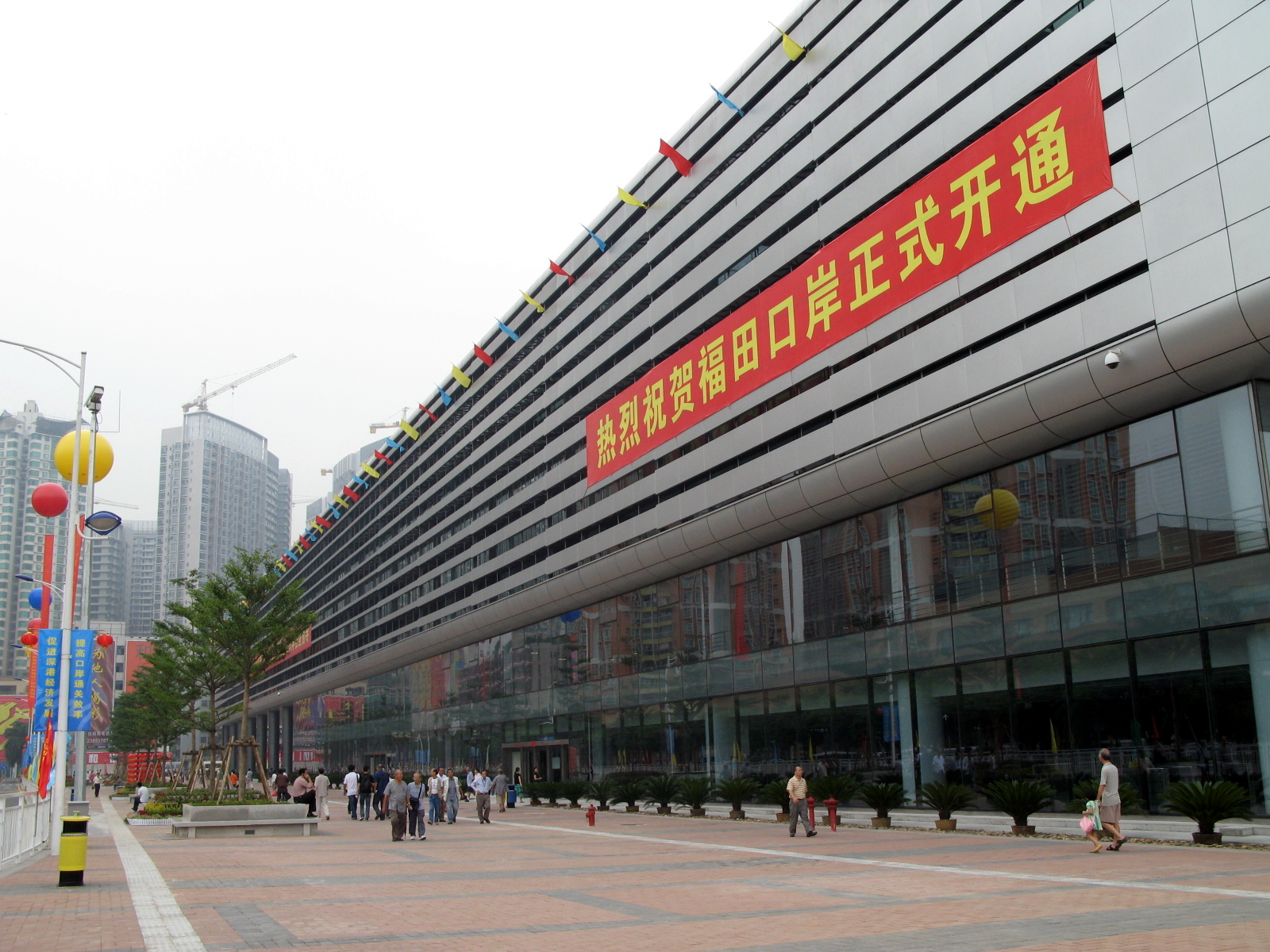 福田口岸內部